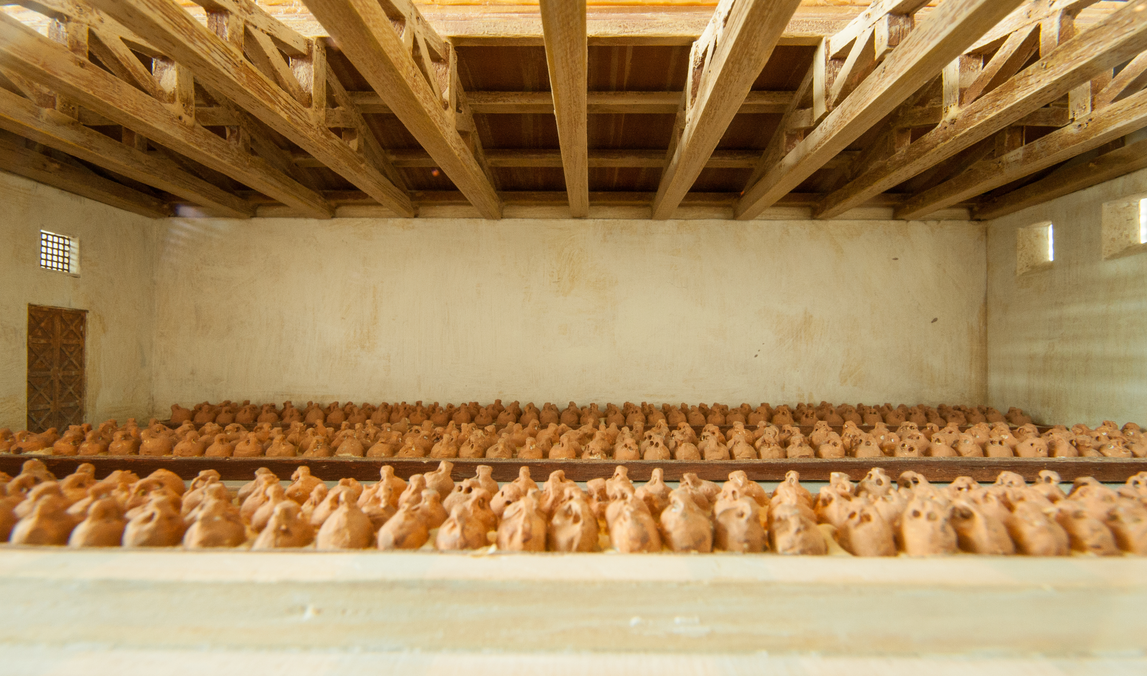 Maquette représentant l'intérieur des entrepôts commerciaux de la Vienne allobroge. Détail de l'atelier du potier. Musée de Saint-Romain-en-Gal.